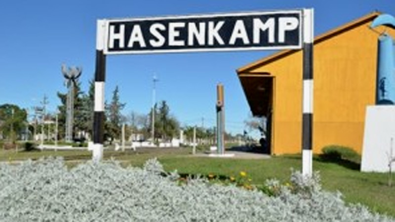 Estación de ferrocarril de la Ciudad de Hasenkamp